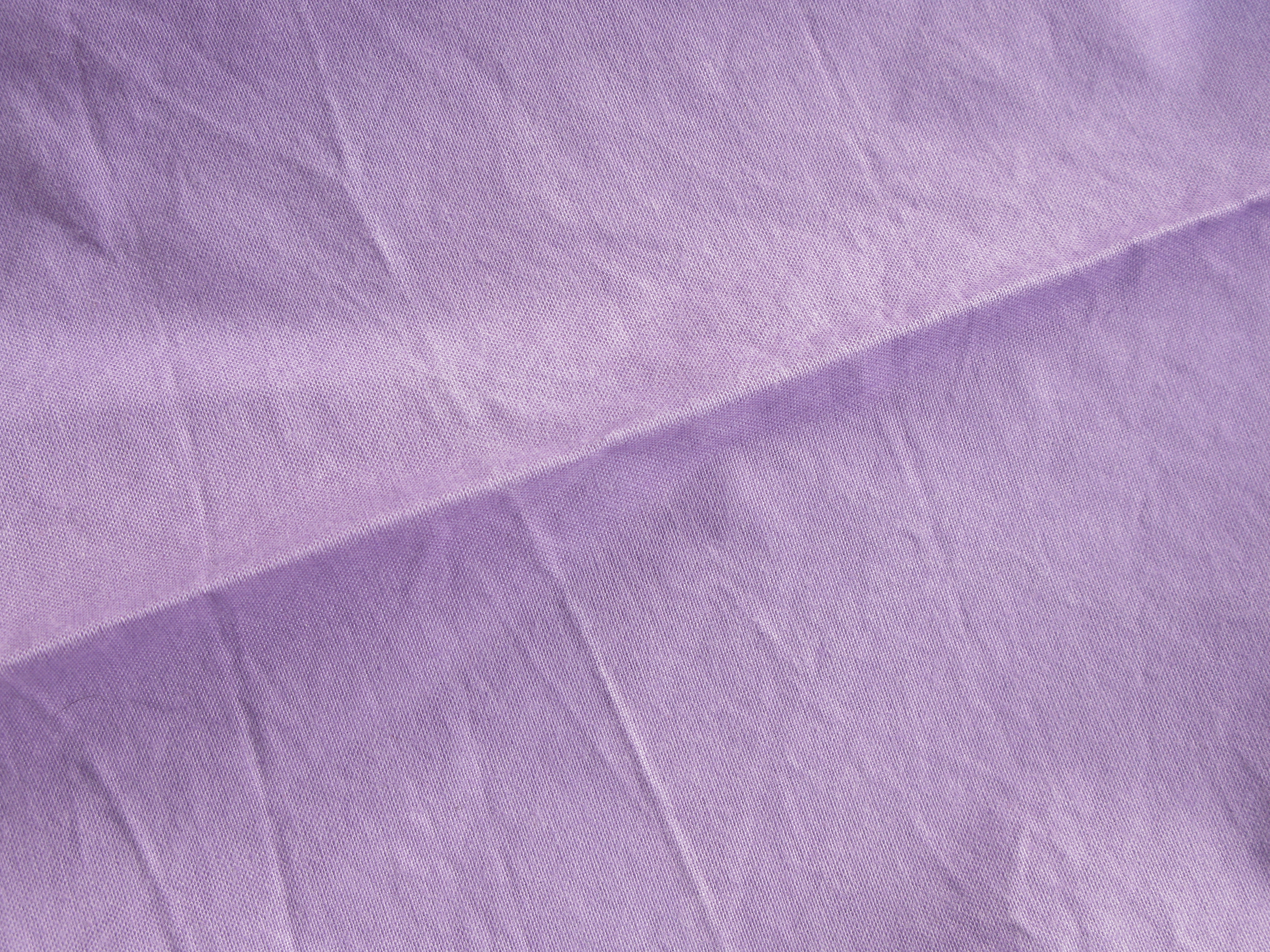 Stoffbruch genannte Falte